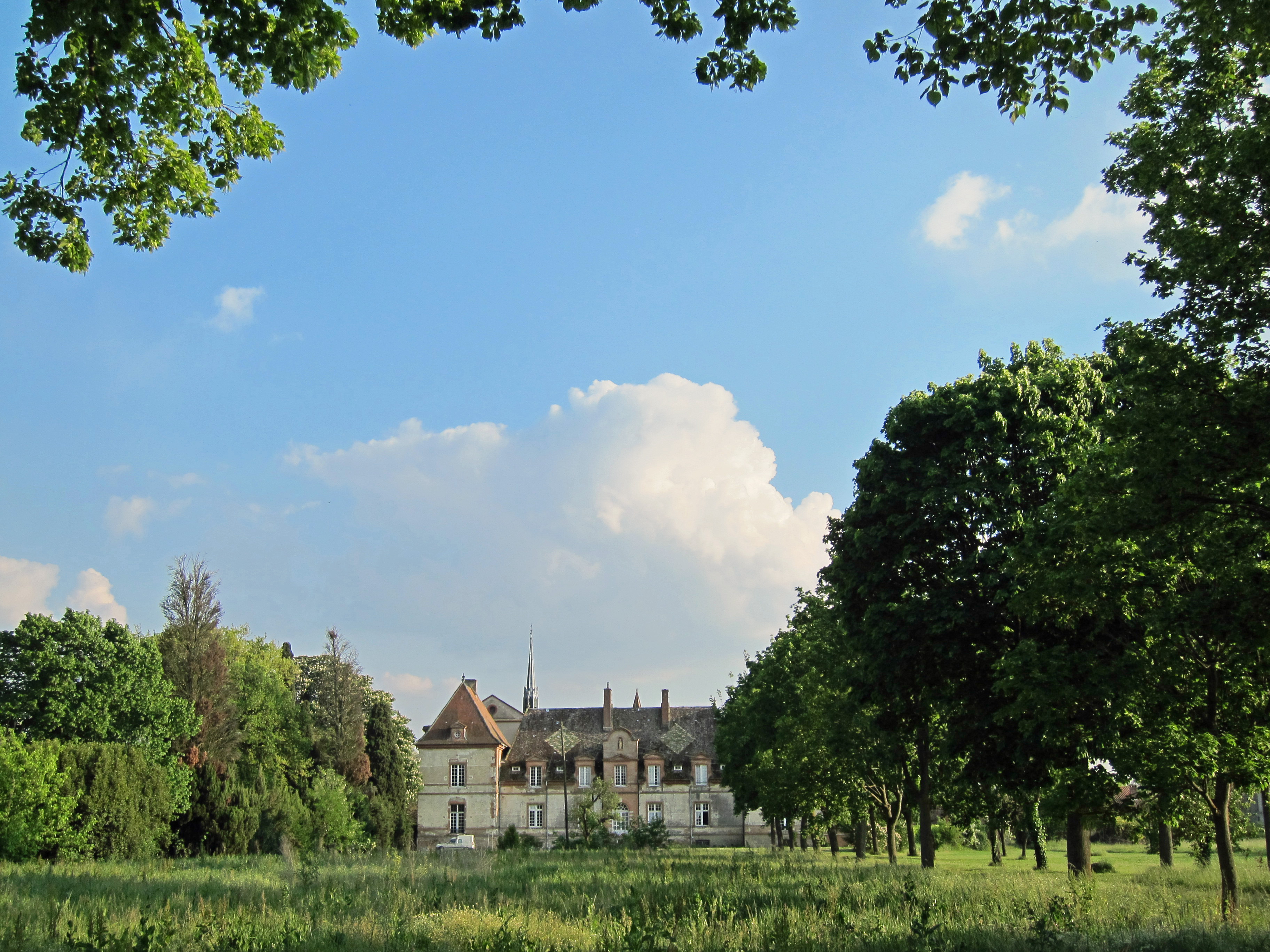 Blagnac (Haute-Garonne, France) : Monastère Sainte-Catherine de Sienne.